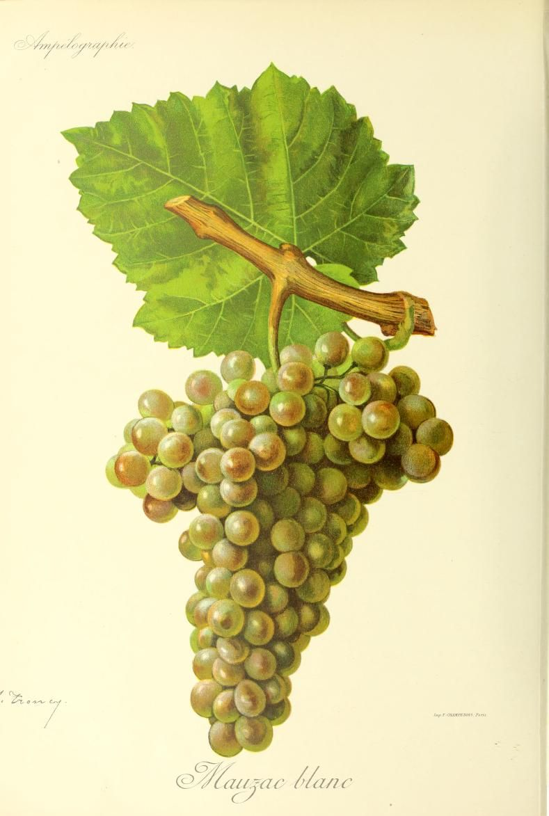 Illustration du cépage Mauzac blanc par Jules Troncy dans l'ouvrage "Ampélographie : traité général de viticulture" publié sous la direction de P. Viala & V. Vermorel avec la collaboration de A. Bacon, A. Barbier, A. Berget [et al.] - Date de l'édition originale : 1901-1910